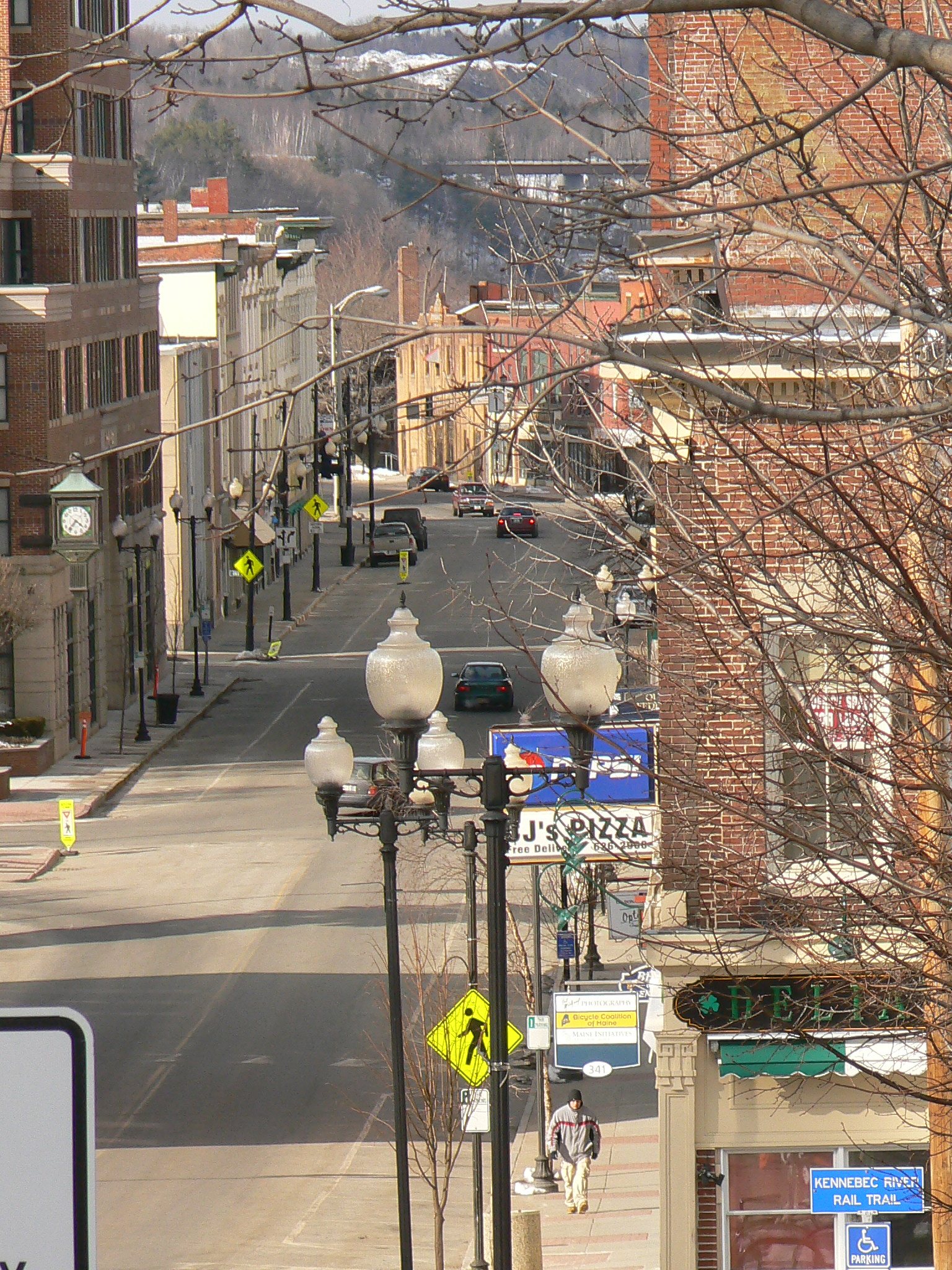 Augusta, Maine